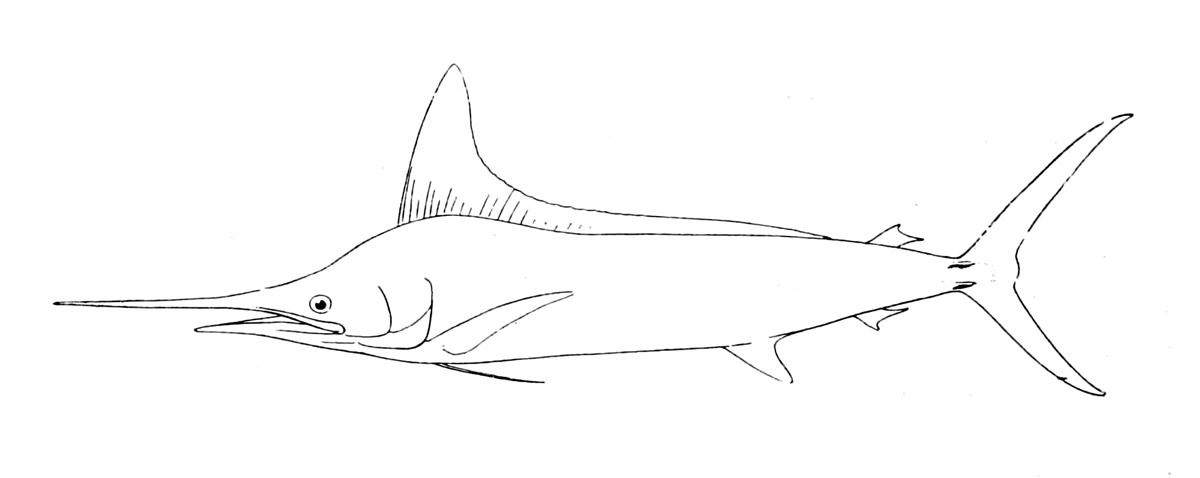 Tetrapturus audax